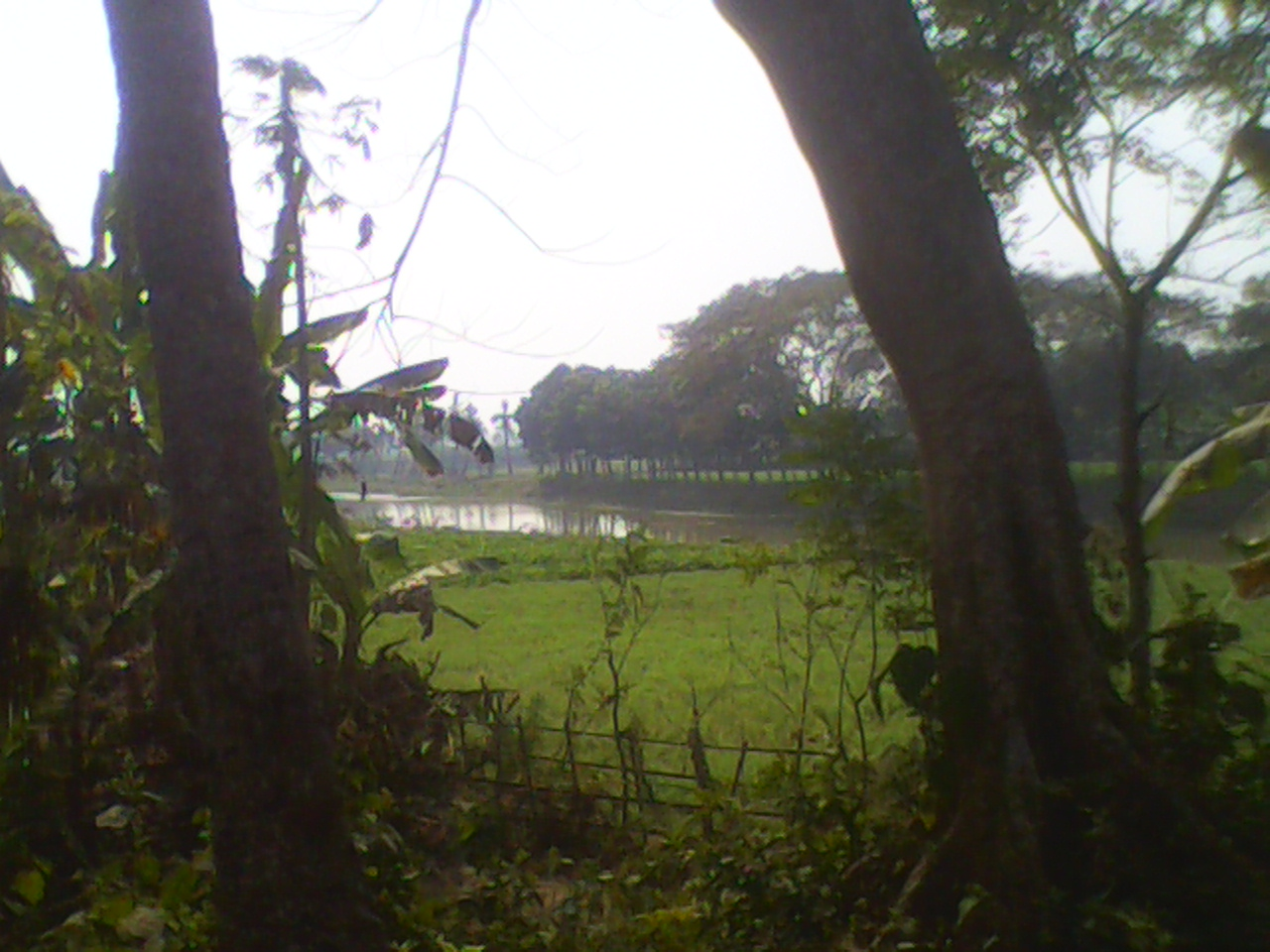 কাজলা নদী